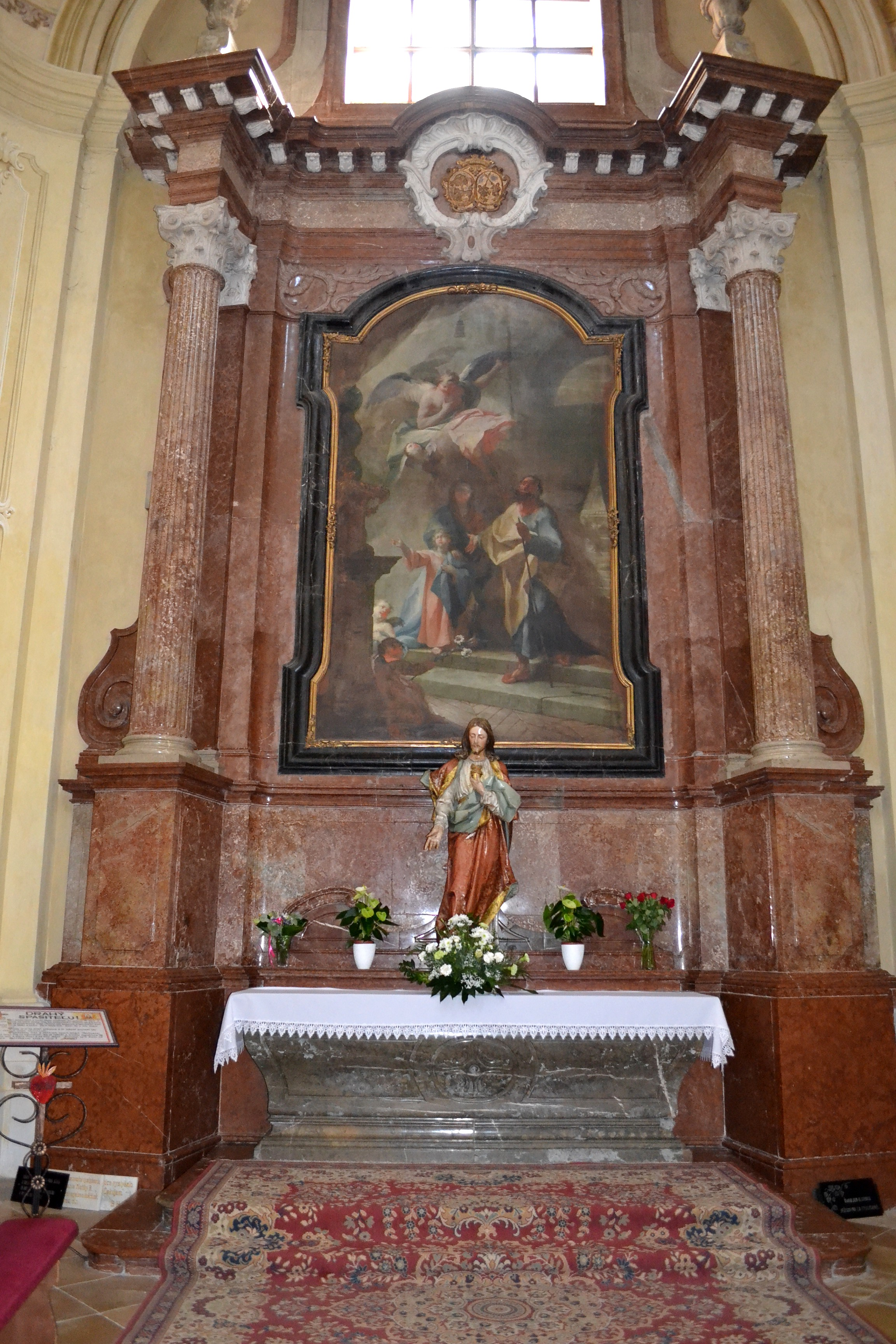 Šaštín-Stráže (okr. Senica), Bazilika Sedembolestnej Panny Márie; kaplnka svätej Rodiny